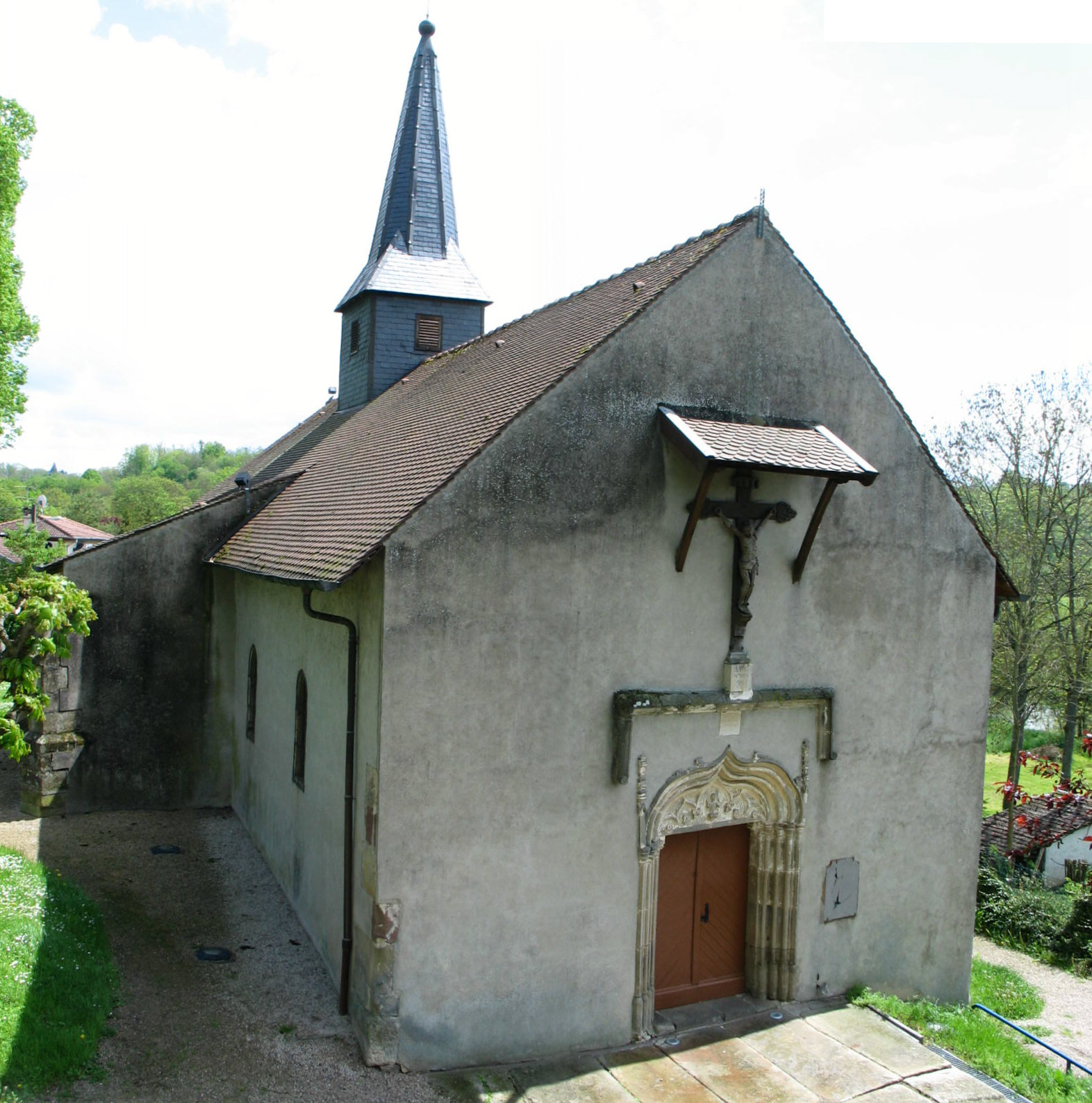 Mirecourt (France, département des Vosges) chapelle de la Oultre sur le faubourg Saint-Vincent.